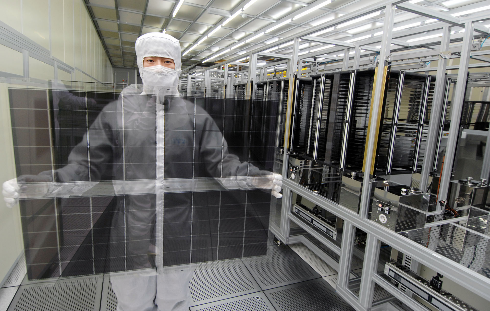 LG전자가 다음달 역대 최강 전략 스마트폰인 ‘G’(코드명)를 출시할 계획이다. ‘True HD IPS+’ 디스플레이를 탑재하고 화질 경쟁력을 앞세워 글로벌 프리미엄 스마트폰 시장 공략에 나선다.